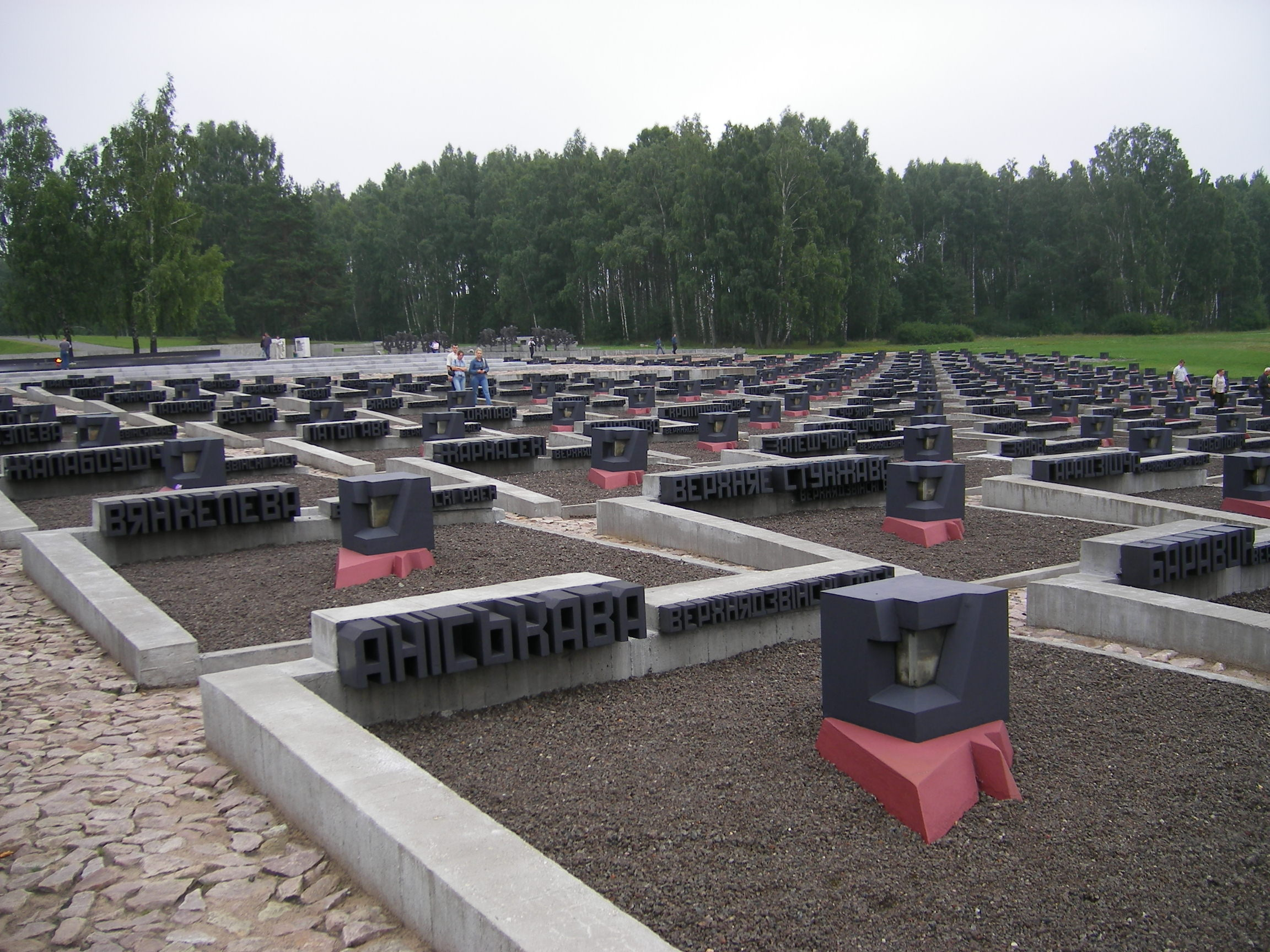 Hatinyi emlékműkomplexum, Belarusz.